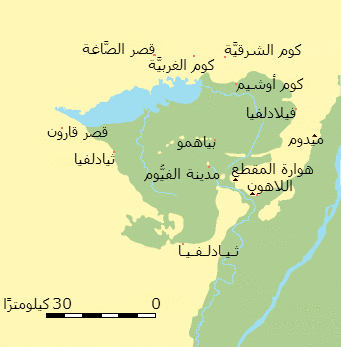 خارطة لِإقليم الفيُّوم في مصر تُظهر أبرز المواقع الأثريَّة والمُدن البائدة، ومدينة الفيُّوم المُعاصرة.